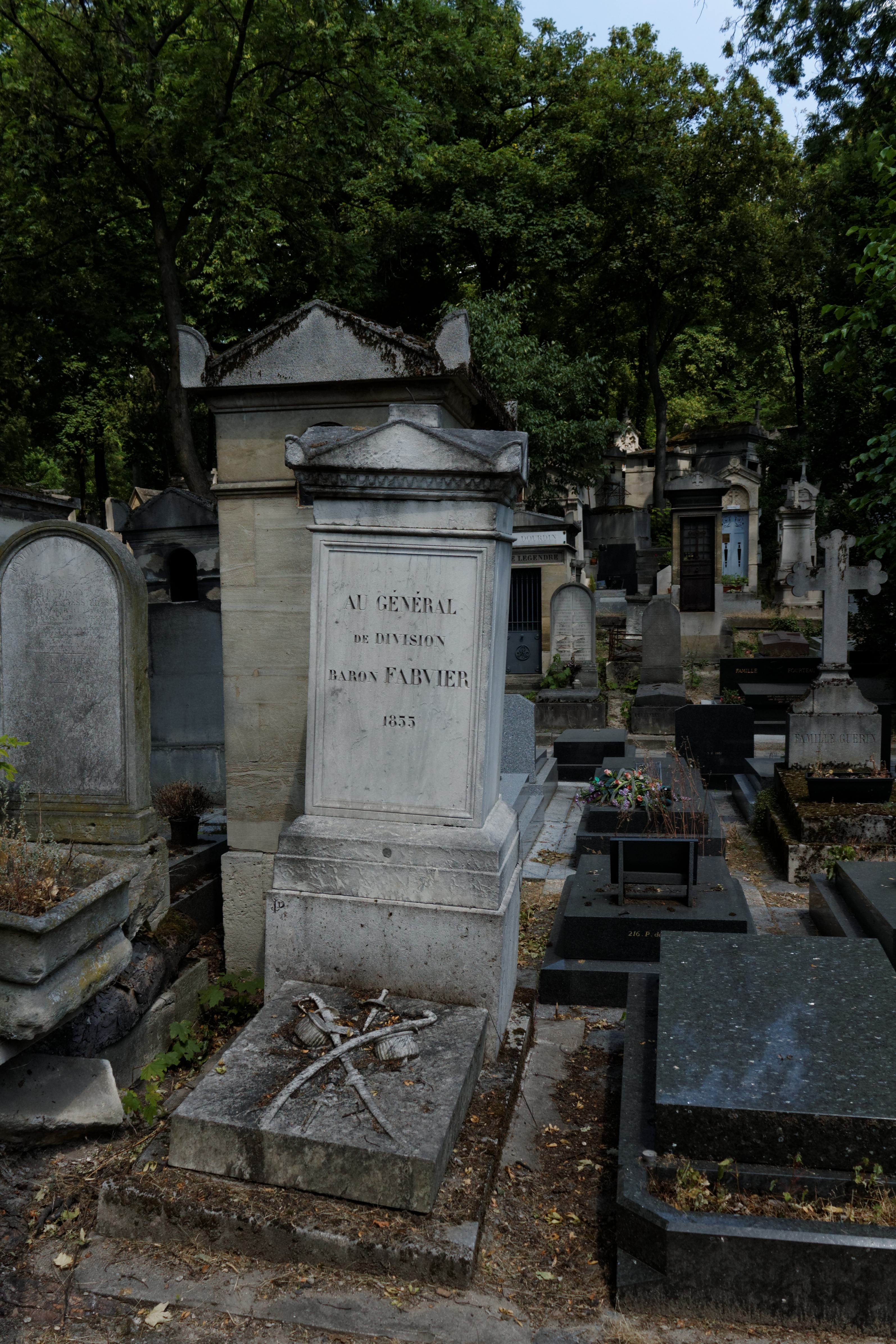 Sépulture du général de division Charles Nicolas Fabvier. Stèle ornée d'un bas-relief représentant des sabres et des épaulettes